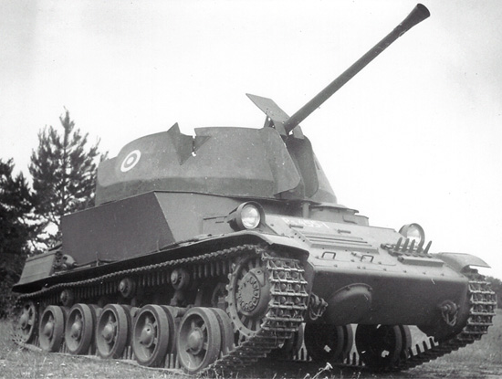 En finsk L-62 Anti II under namnet ItPsv 41